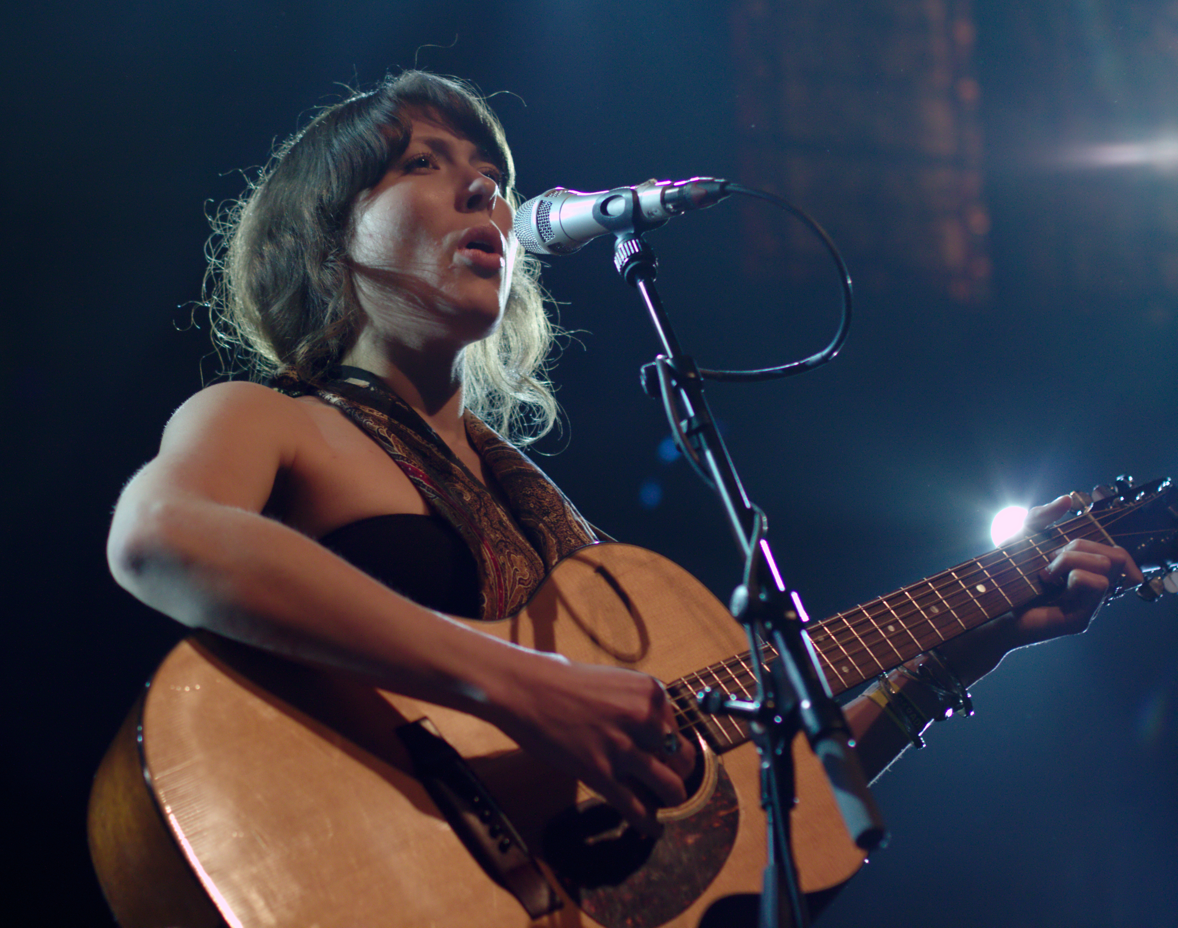 Alela Diane in Paradiso, Amsterdam, 2009-04-08